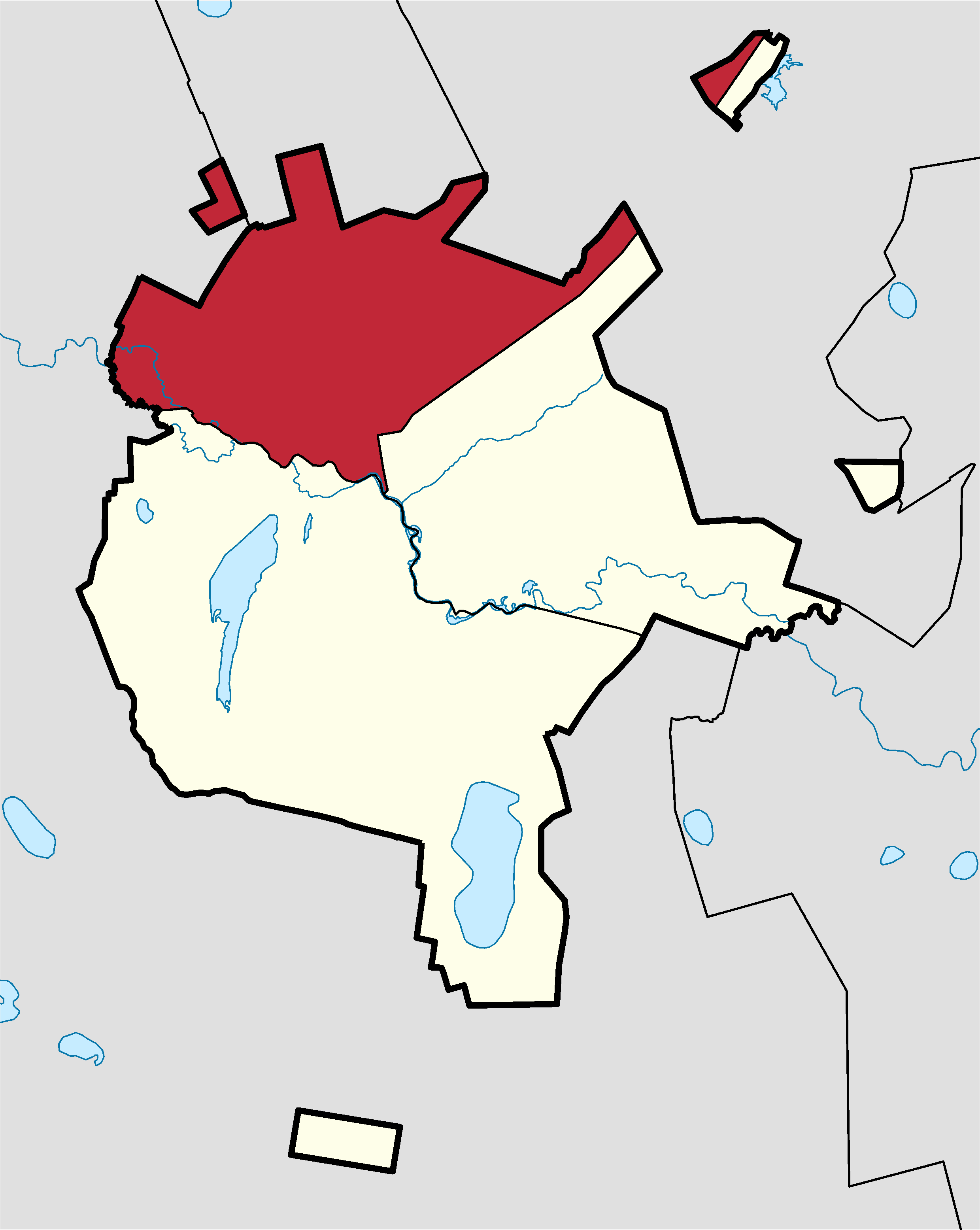 Сарыаркинский район г.Нур-Султан